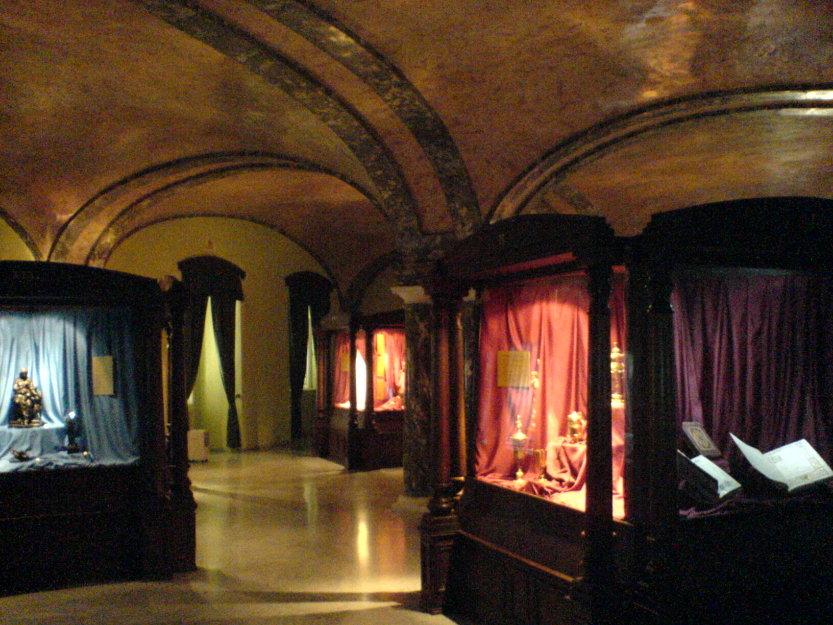 Festetics-kastélyegyüttes – kastélymúzeum This is a photo of a monument in Hungary. Identifier: 10876